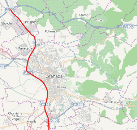 Circunvalación de Granada